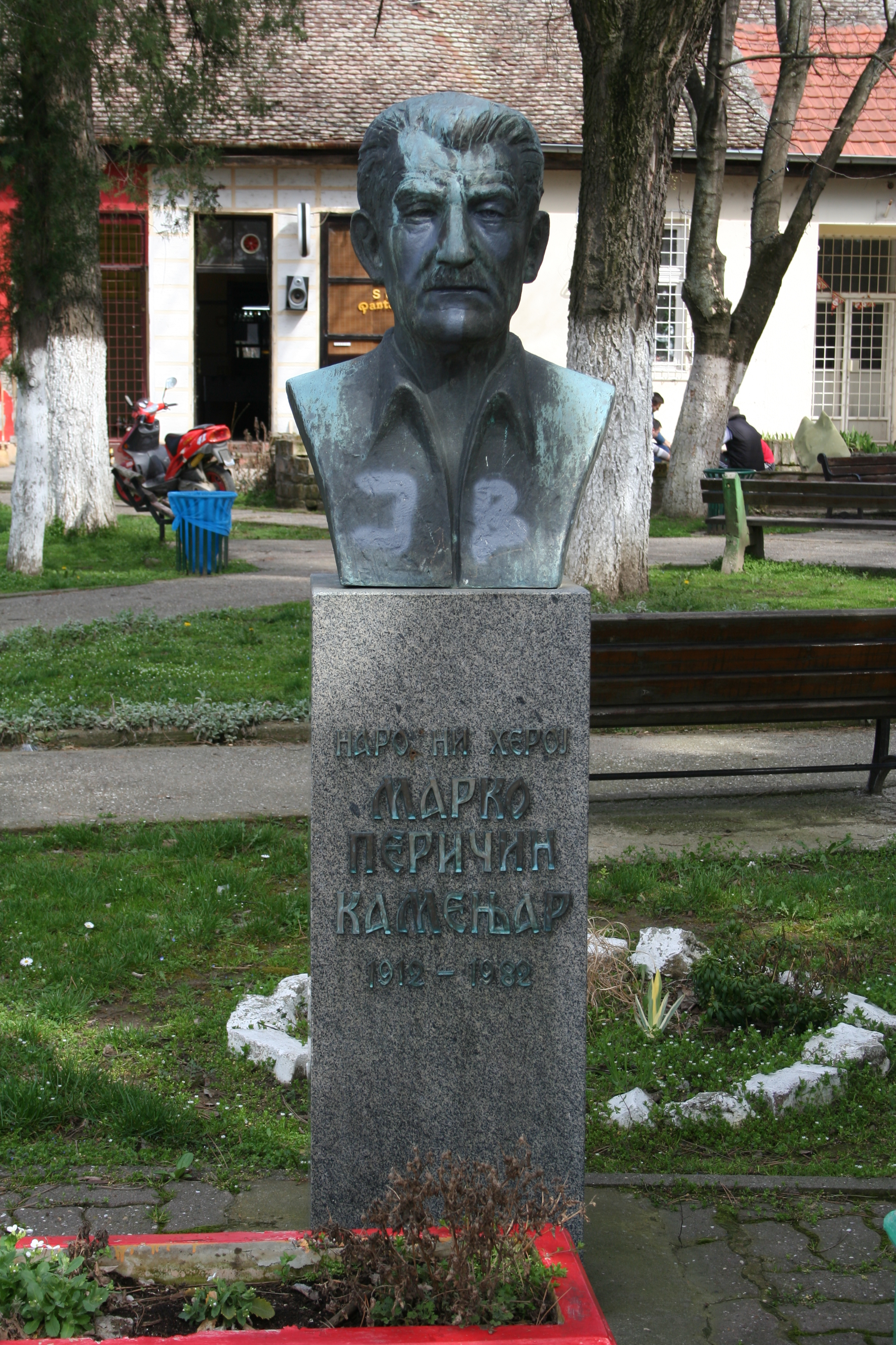 Grgurevci